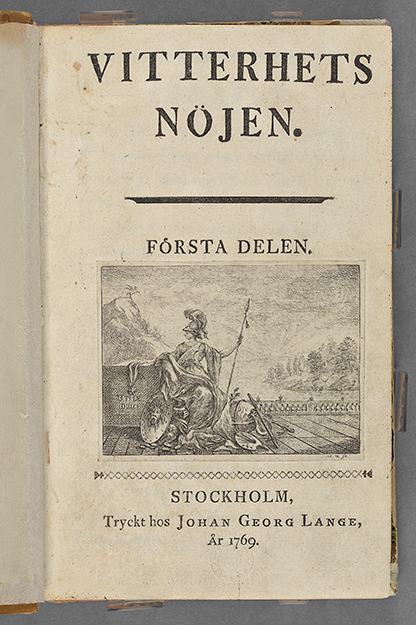 Vitterhets-nöjen, titlepage